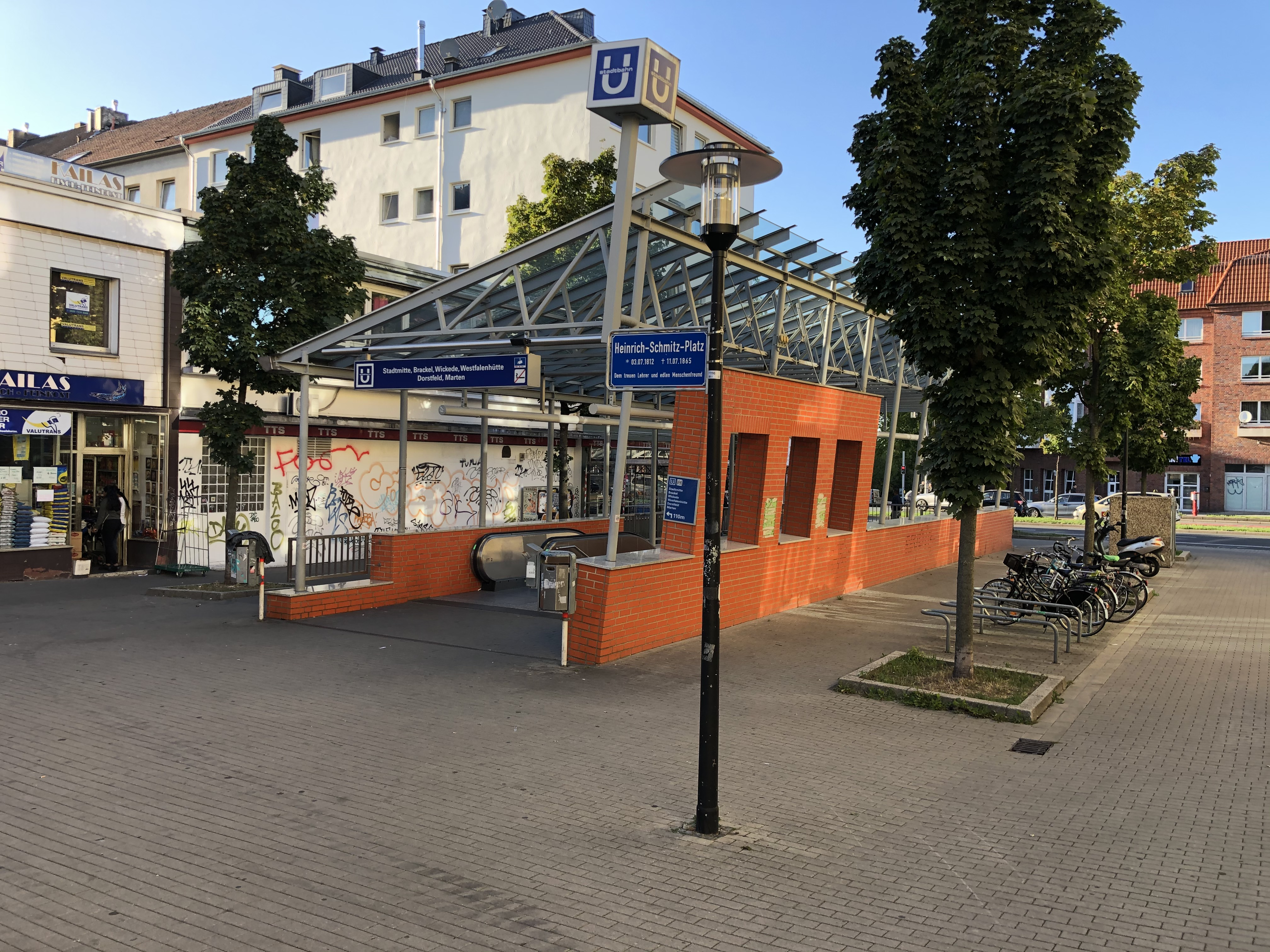 Blick auf den Heinrich-Schmidt-Platz mit Straßenschild und auf die prägnante U-Bahn-Station Unionstraße. Die Aufschrift auf dem Schild lautet: "Heinrich-Schmidt-Platz, *03.07.1812 † 11.07.1865, Dem treuen Lehrer und edlem Menschenfreund"This is a photograph of an architectural monument., no. 0